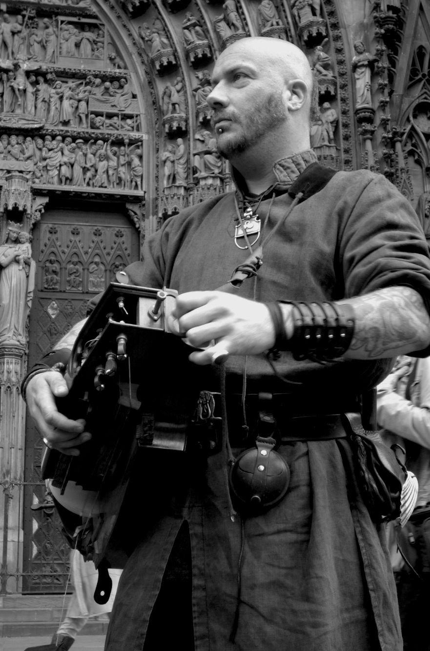 Luc Arbogast, place de la Cathédrale à Strasbourg, 2011